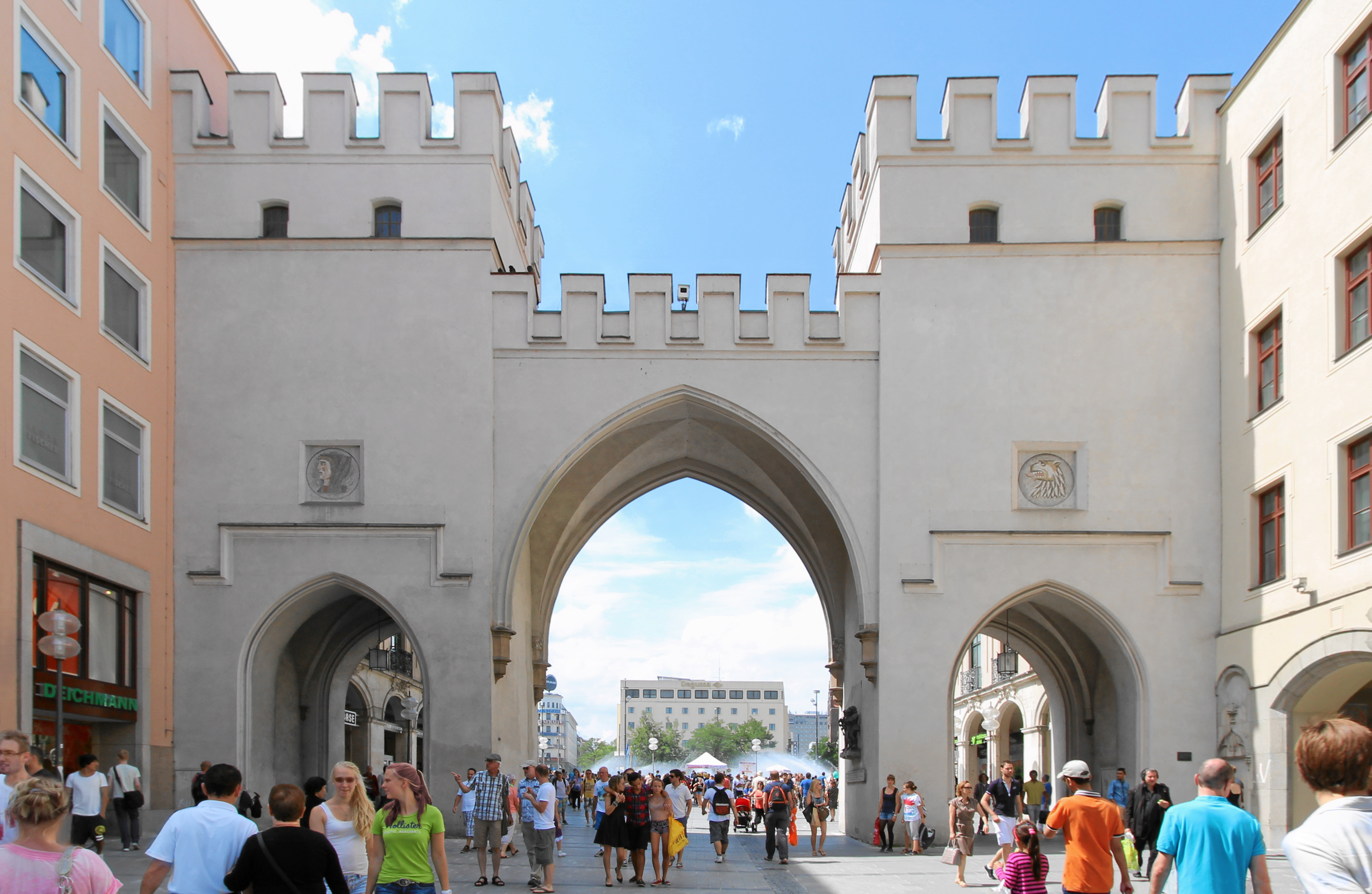 Karlstor in München, 2014